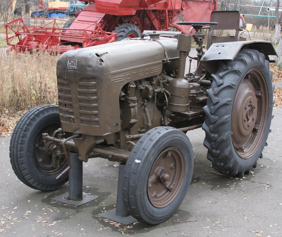 Трактор ДТ-20 в Саратове на Соколовой горе